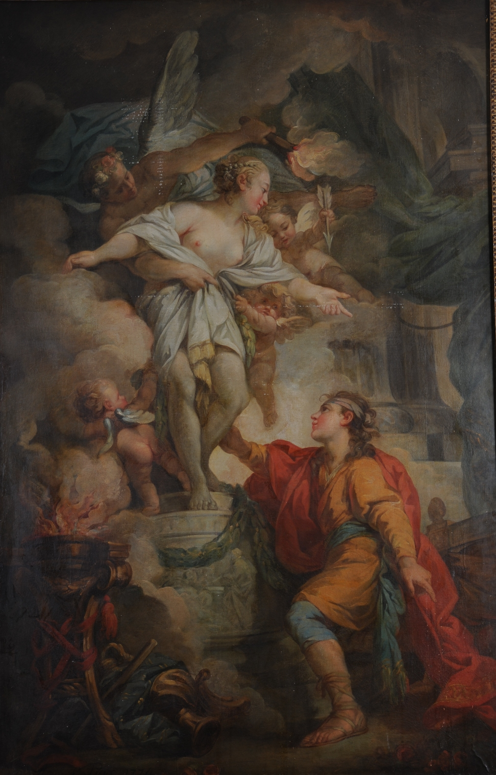 Одна из четырех работ Жана-Жака Лагрене (младшего) в коллекции Международного института антиквариата ASG